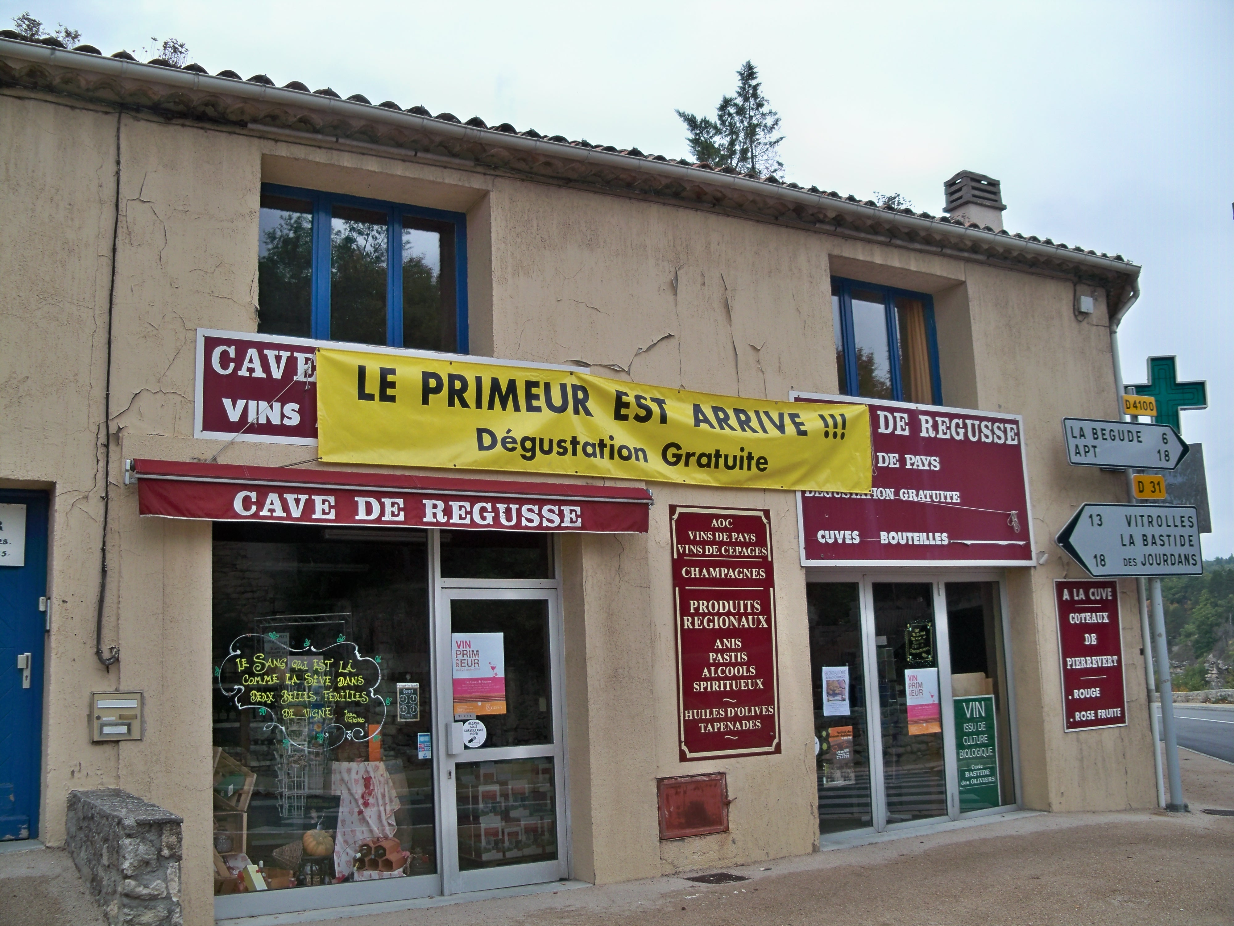 Caviste à Céreste, Alpes de Haute Provence, France